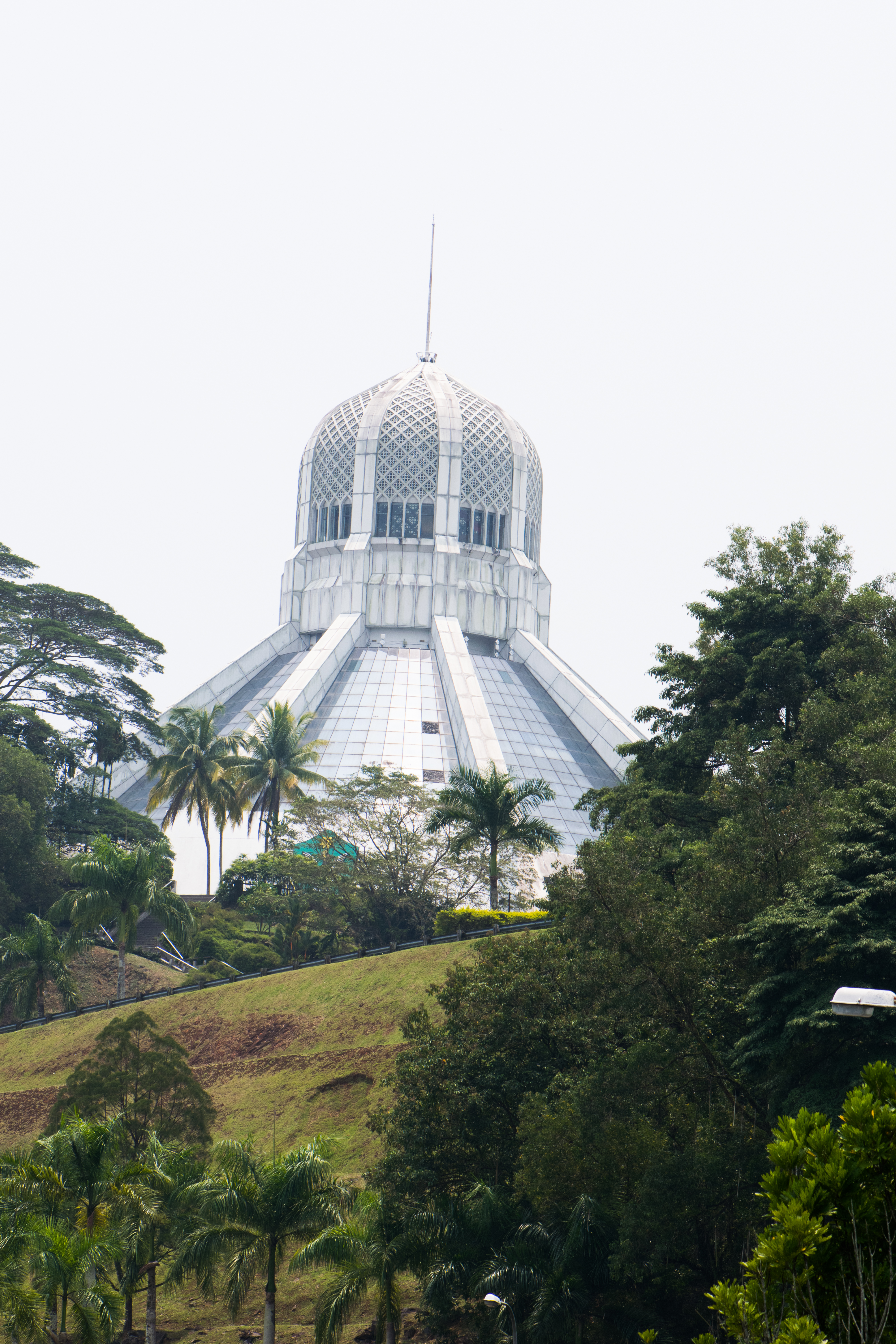 Kuching, Sarawak, Borneo, Malaysia